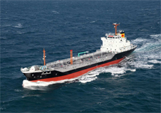 上野トランステック 社船